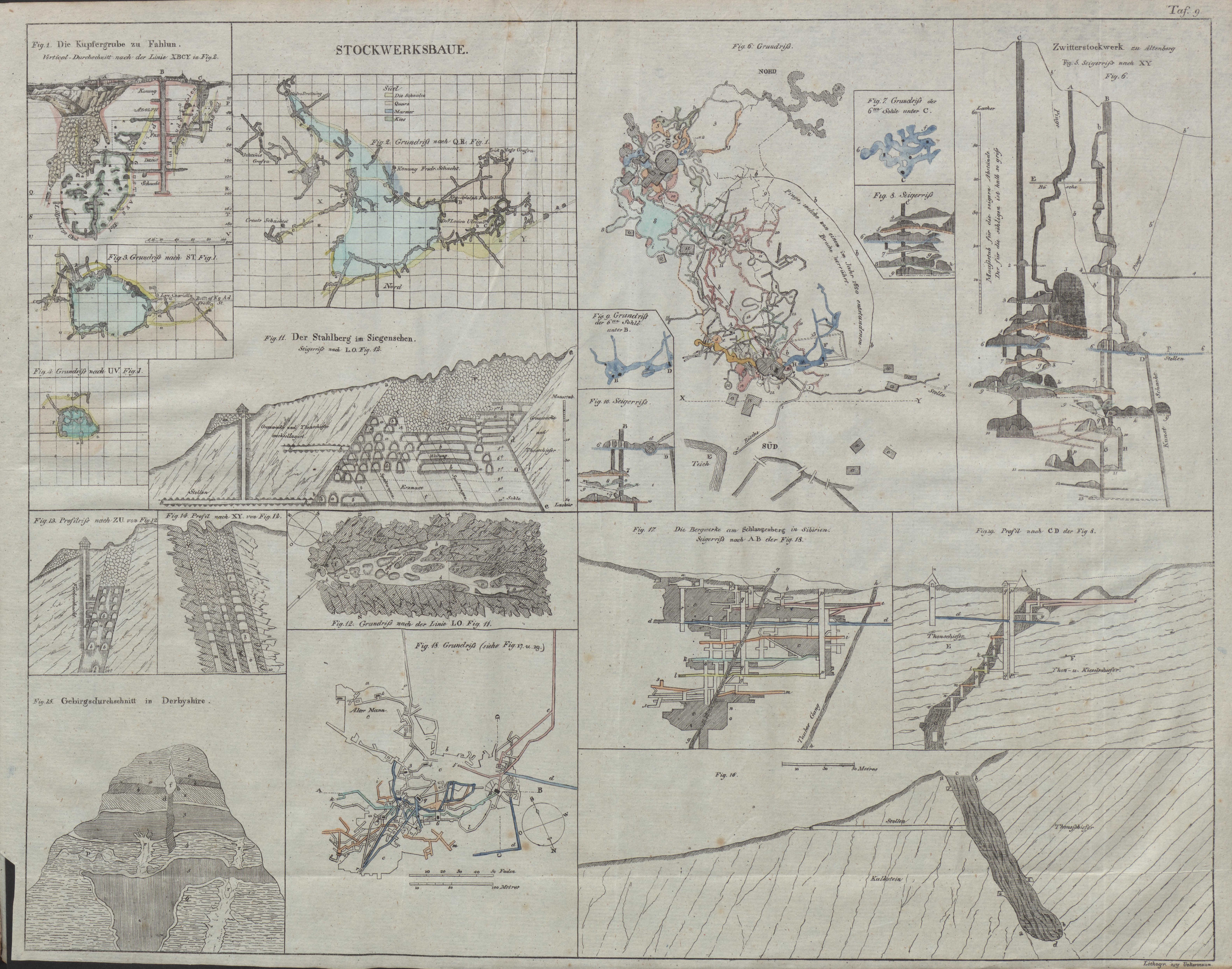 Abbildung aus: Atlas zu des Herrn von Villefosse Mineral-Reichthum